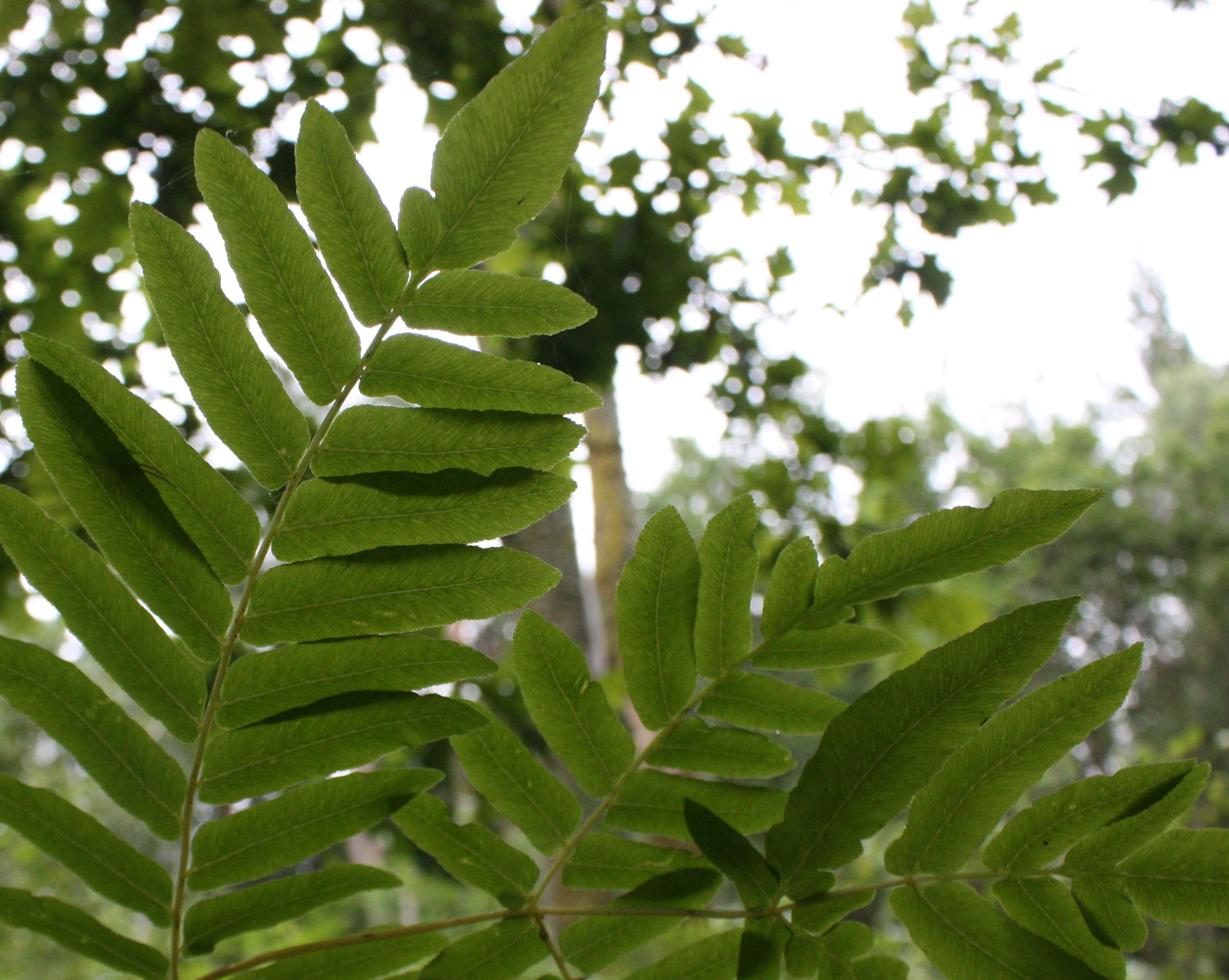 podezřeň , výřez, Osmunda regalis